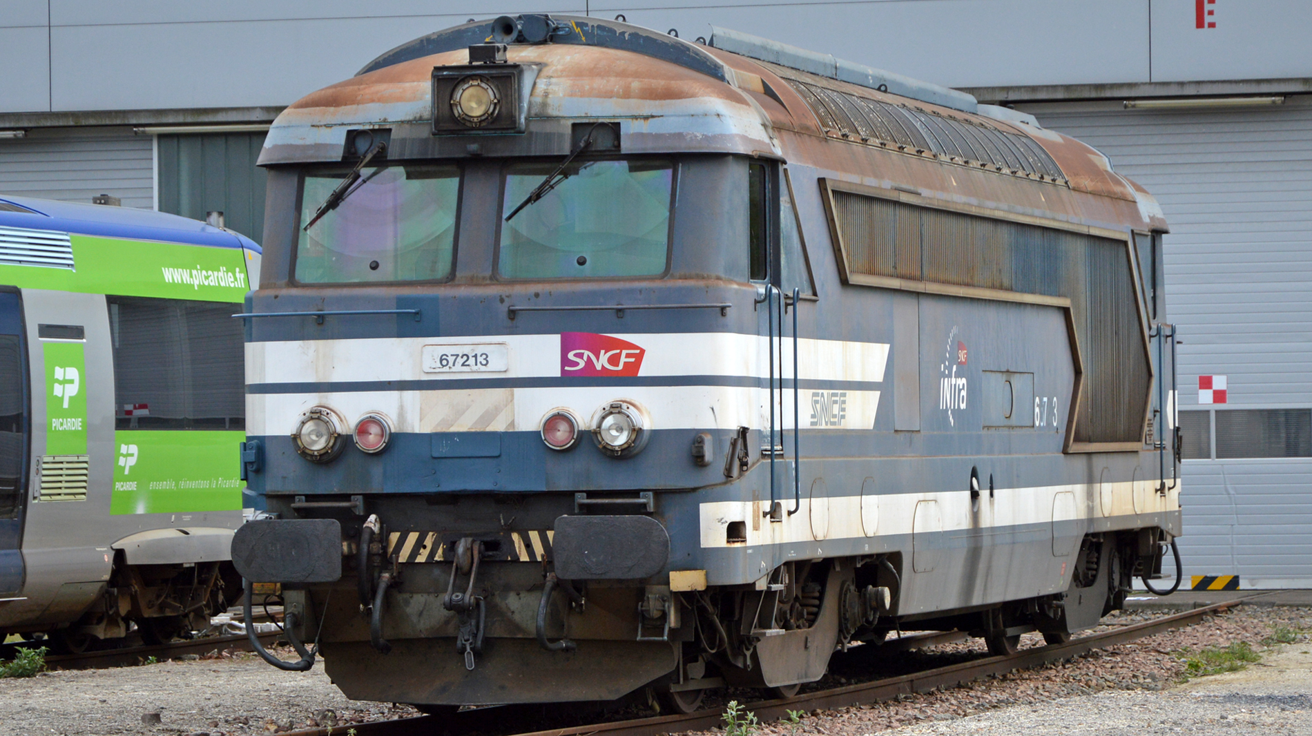 BB 67213 à Longueau